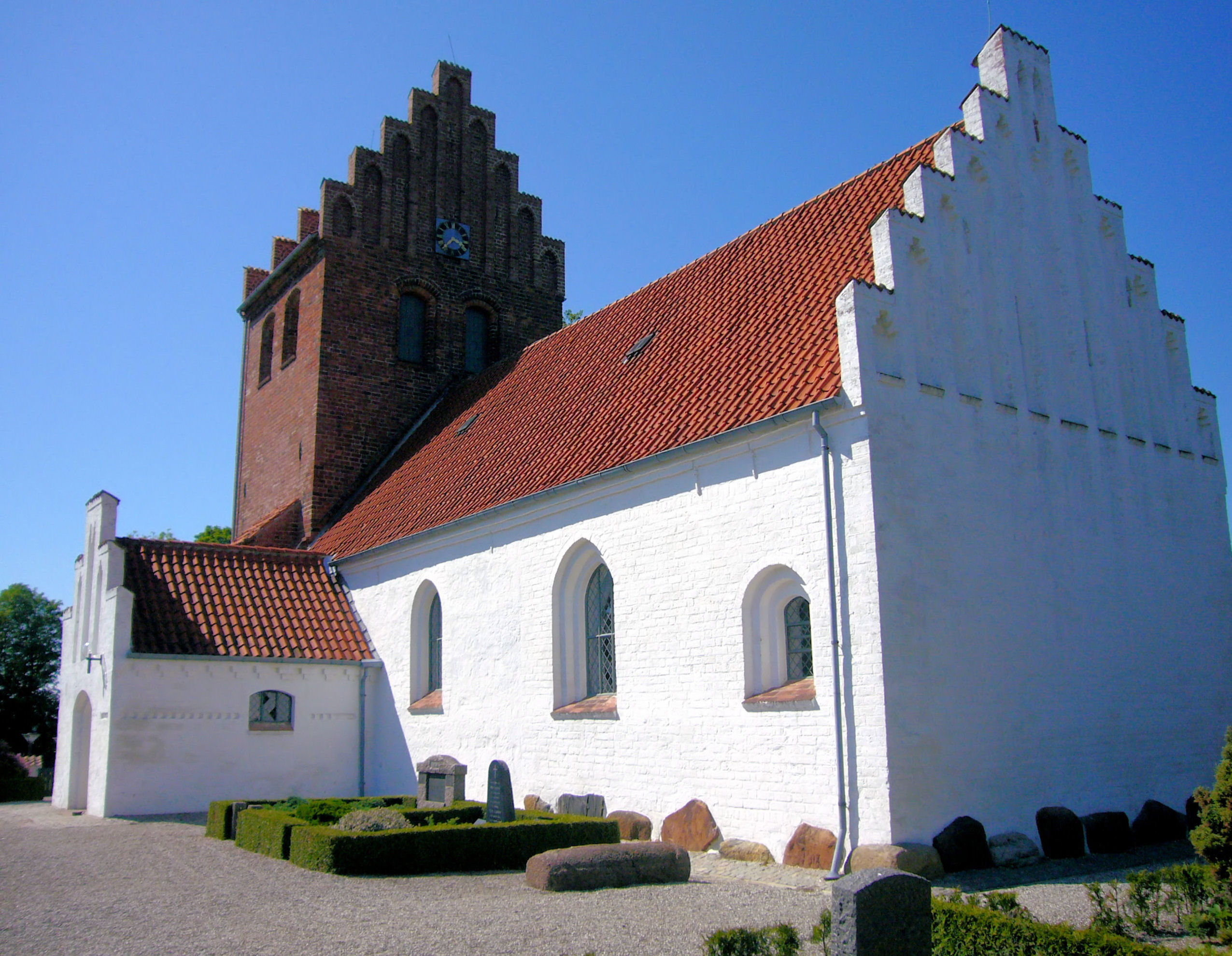 Torslunde Kirke, Ishøj, Denmark. Exterior.